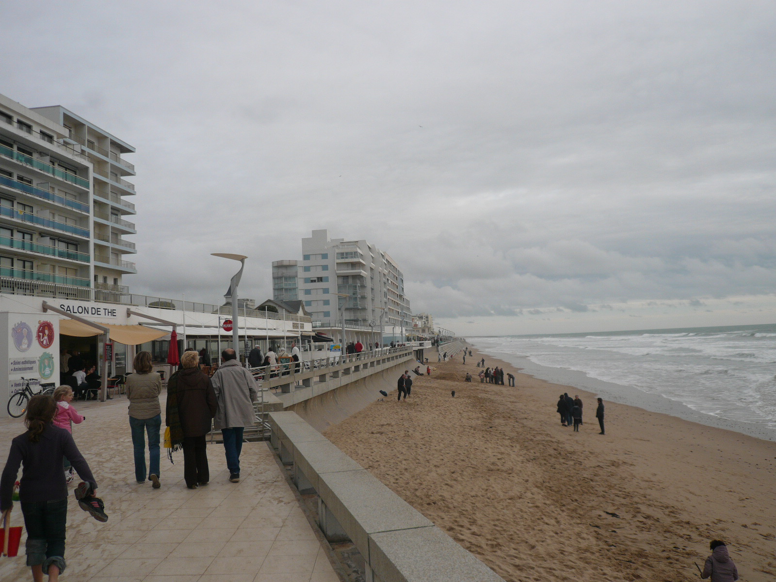 Saint-Gilles-Croix-de-Vie dans le département de la Vendée (France) : Le remblai (avenue Maurice Perray) et la « grande plage » bordée de barrières garde-corps, côté Saint-Gilles en octobre 2008.